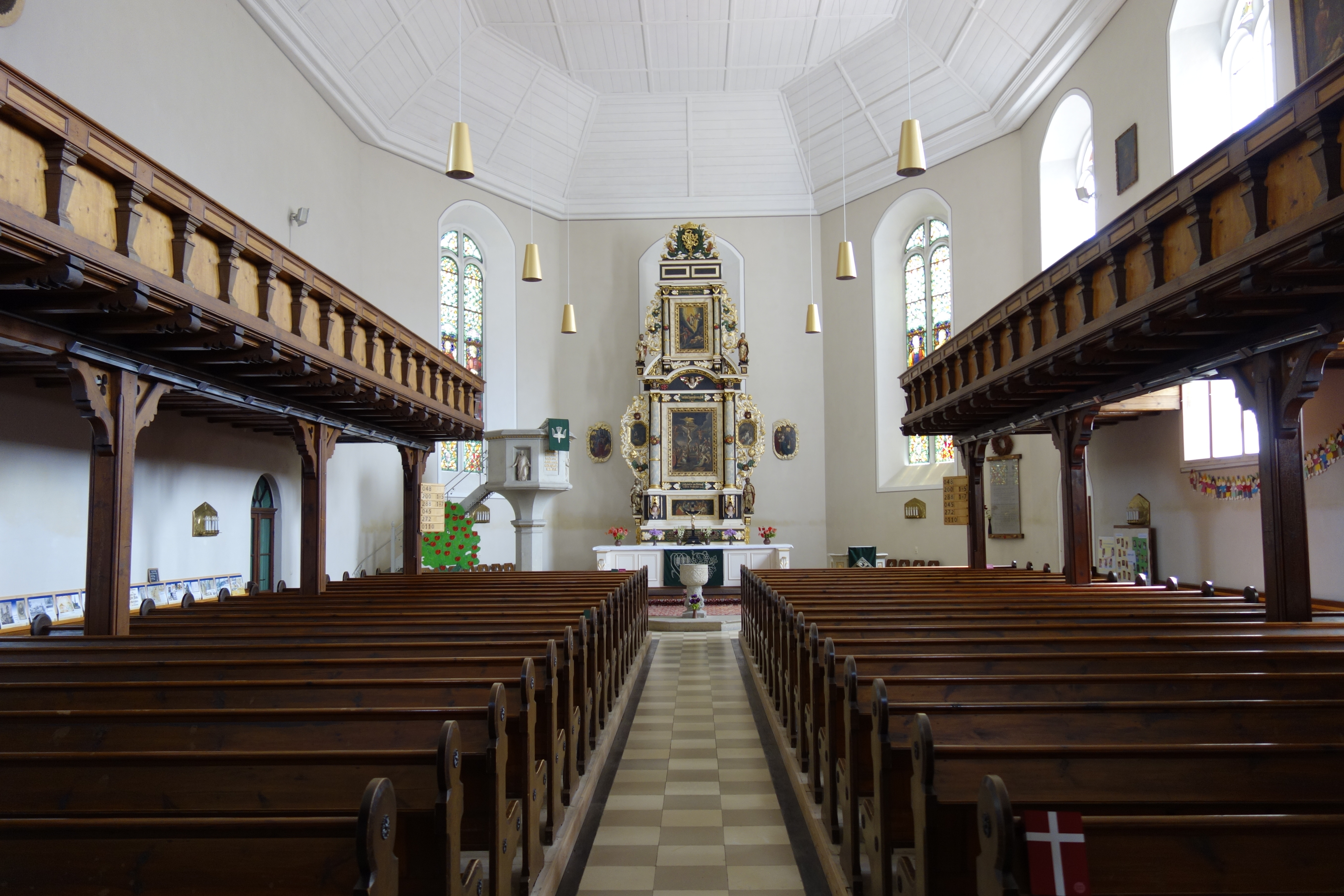 Kirche Königsbrück Juli 2017 (11)